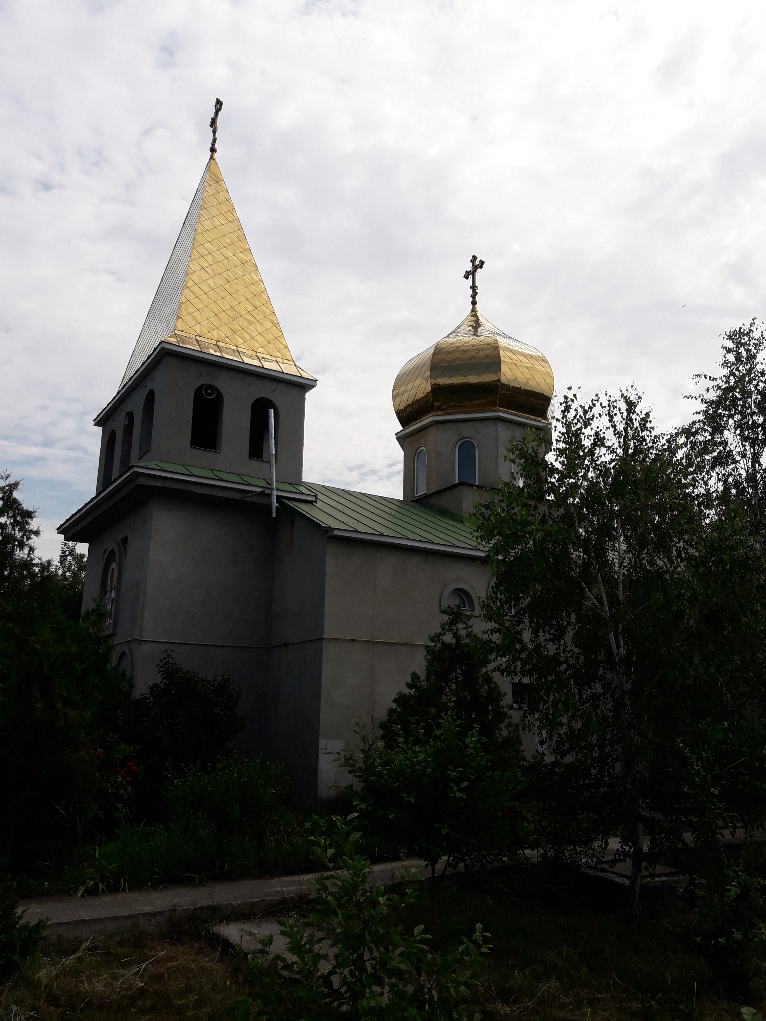 Церква Св. Миколая, Одеса